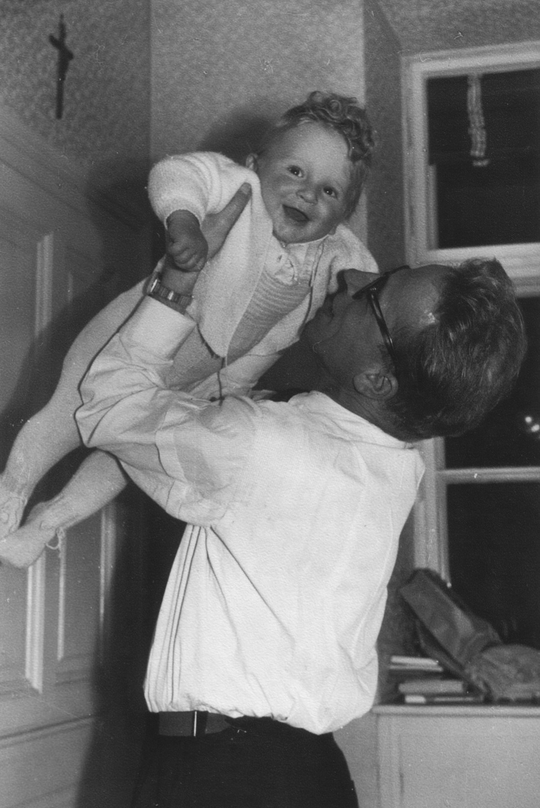 Karl Fischer mit seinem Sohn, 1959; Aufnahme von Dipl. Ing. Konstantin Jawecki, Onkel von Dnalor_01.